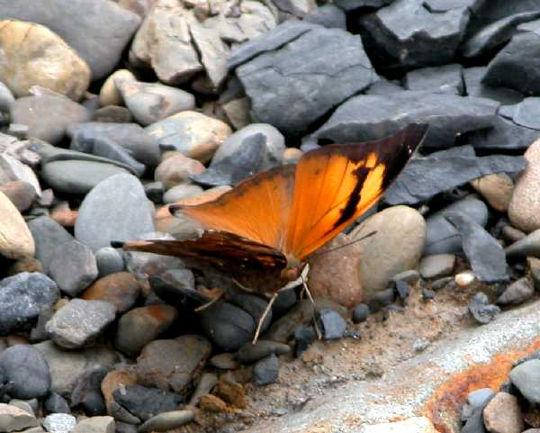 Autumnleaf Doleschallia bisaltide in Jairampur, Arunachal Pradesh, India.